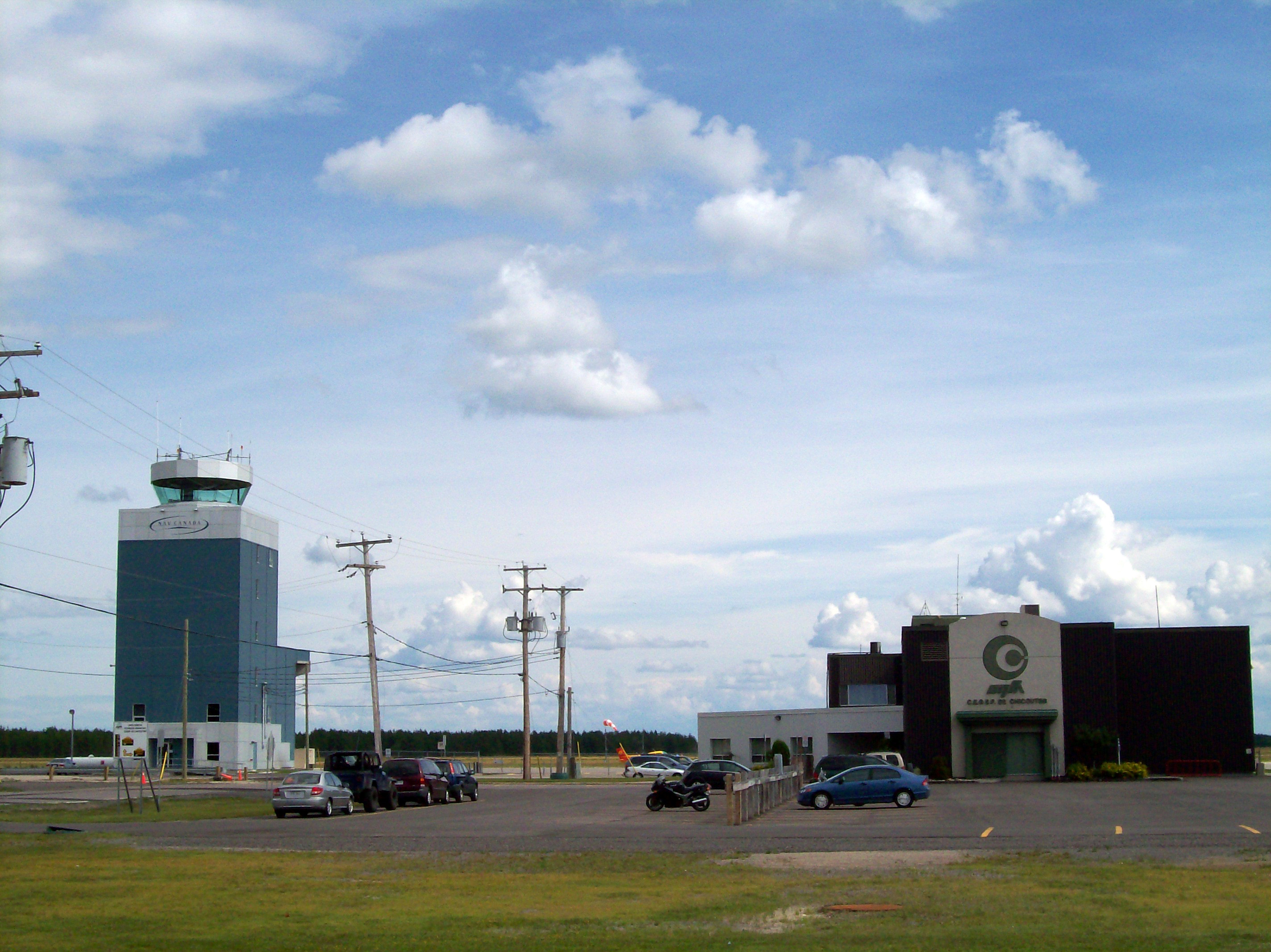 Vue de l'aéroport de Saint-Honoré, Québec, Canada, à partir de la route y menant.